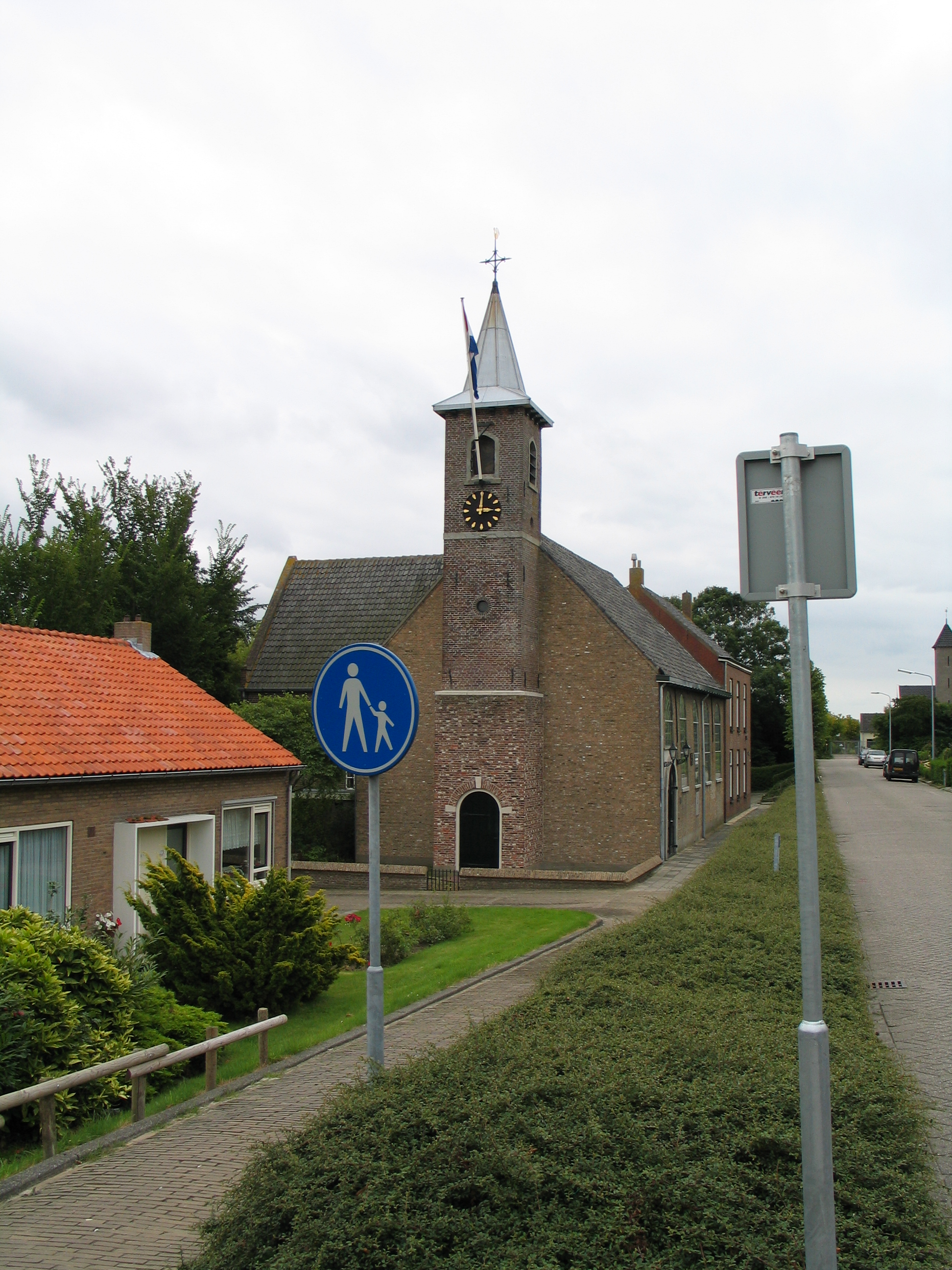 Foto genomen vanaf de Scharloodijk, ter hoogte van de visbank.